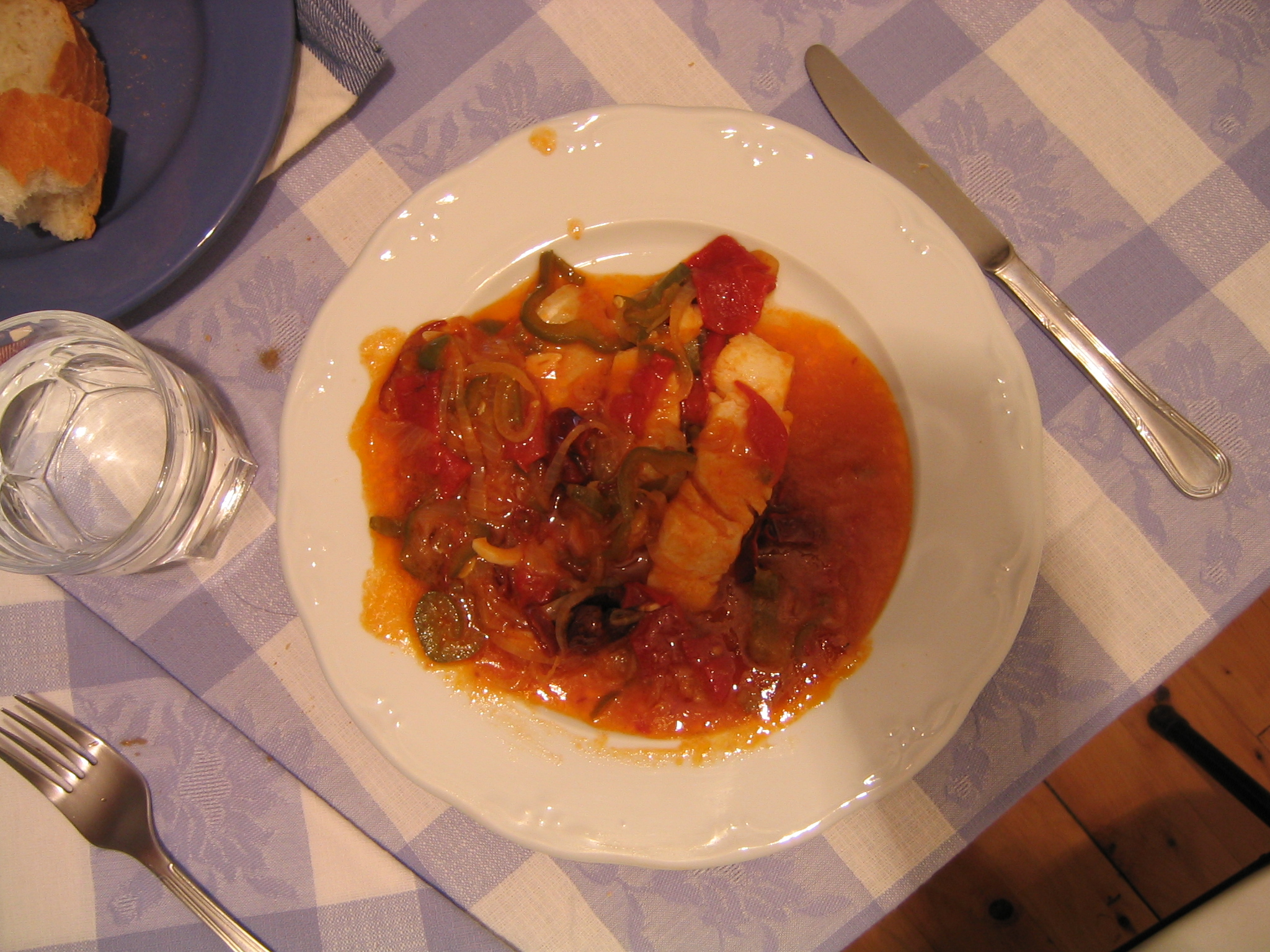 Ajoarriero, plato típico de origen vasco. españa.